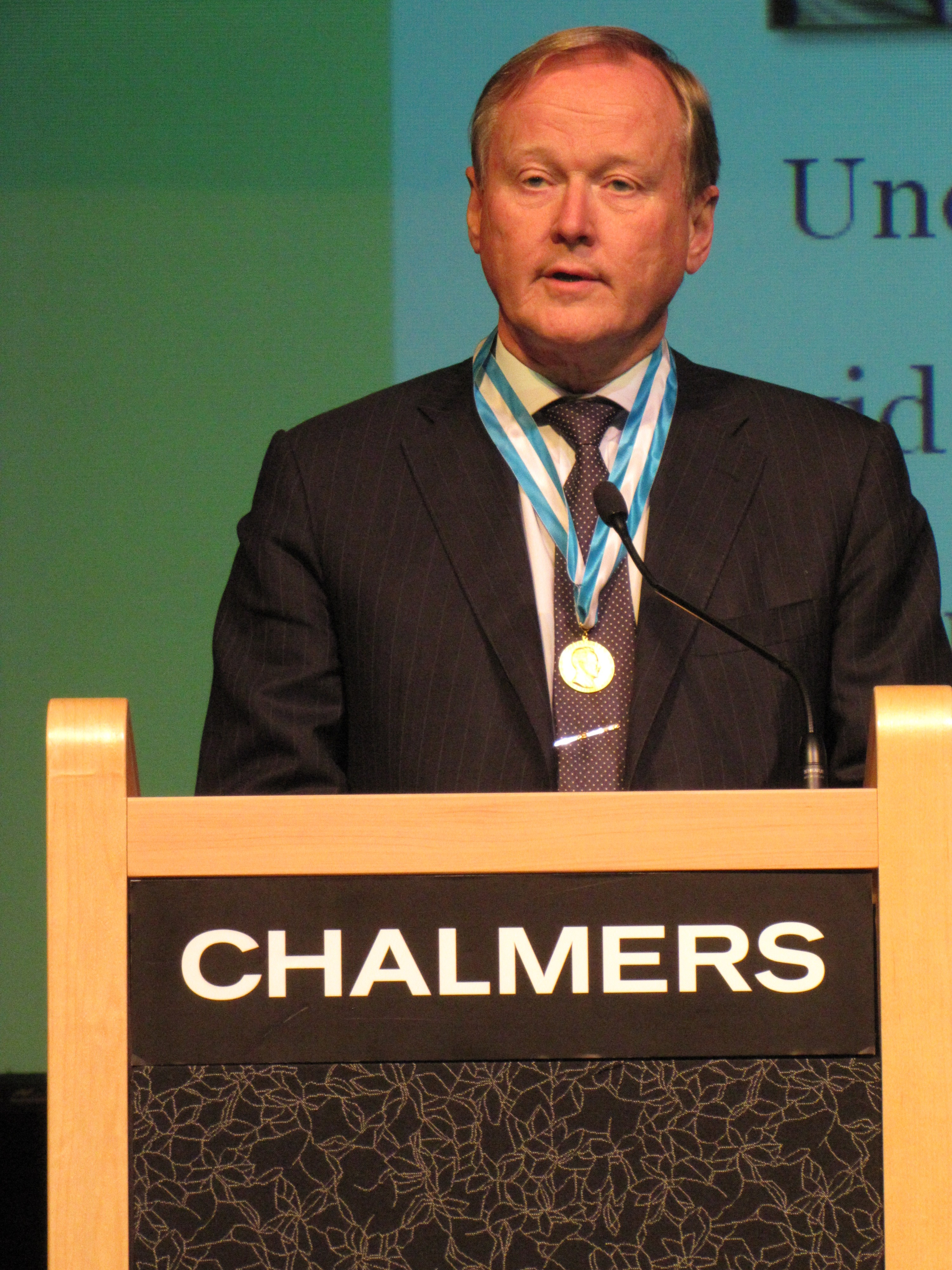 Leif Östling, chef för Scania, har precis tilldelats Gustaf Dalén-medaljen 2012, den 28 april 2012 i Chalmers kårhus.